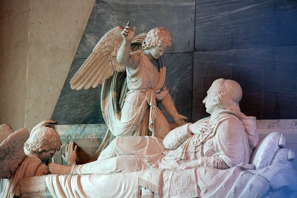 Habsburg–E​stei Károly Ambrus főherceg, hercegprím​ás (Milánó, 1785 – Tata, 1809)